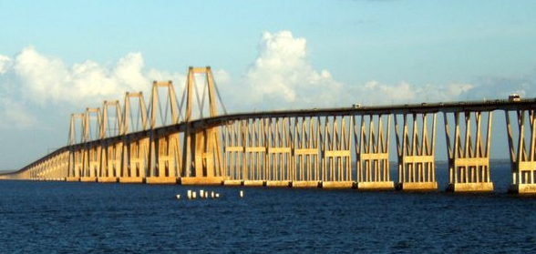 Puente Rafael Urdaneta